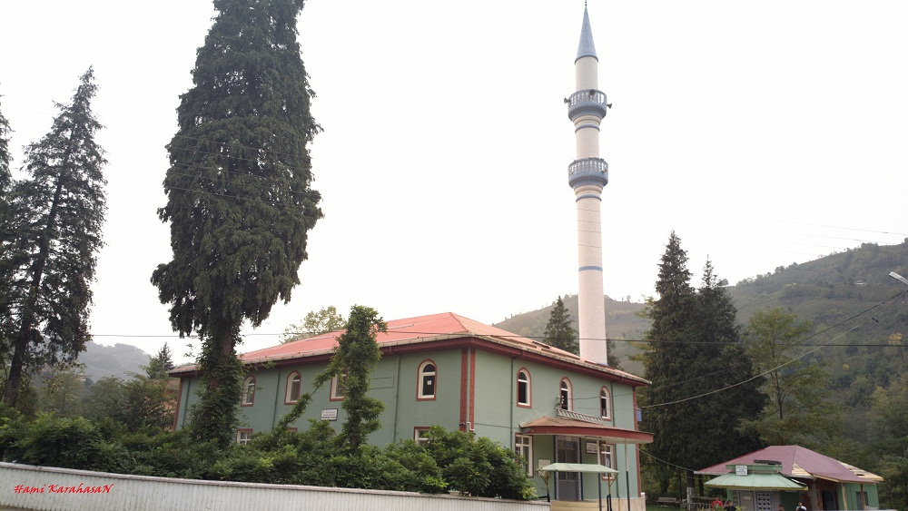 Saraycık belediyesi